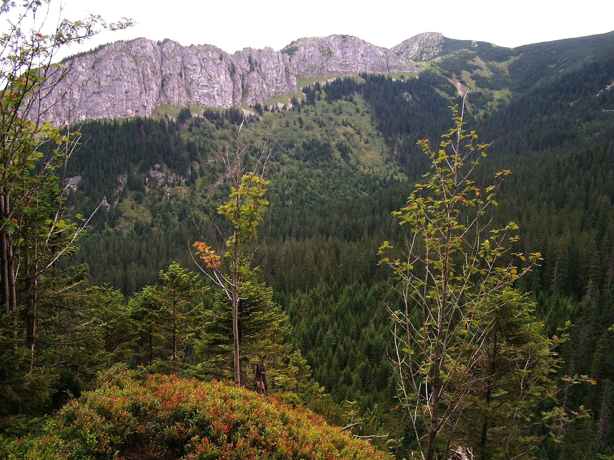 Widok z północnej grani Kasprowego Wierchu